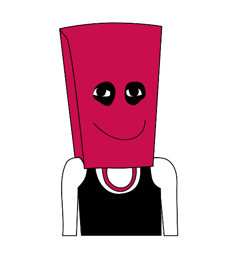 Valentina Carro Padín, caricatura en Tinta de Lura